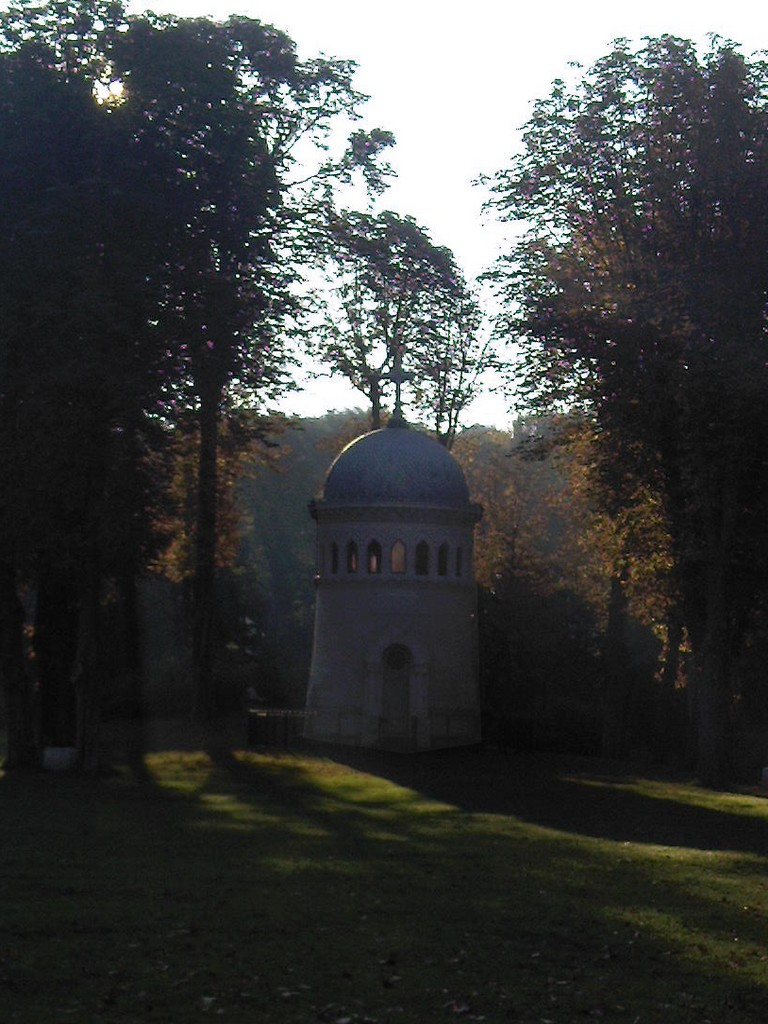 Drancy - Parc de Ladoucette, le mausolée